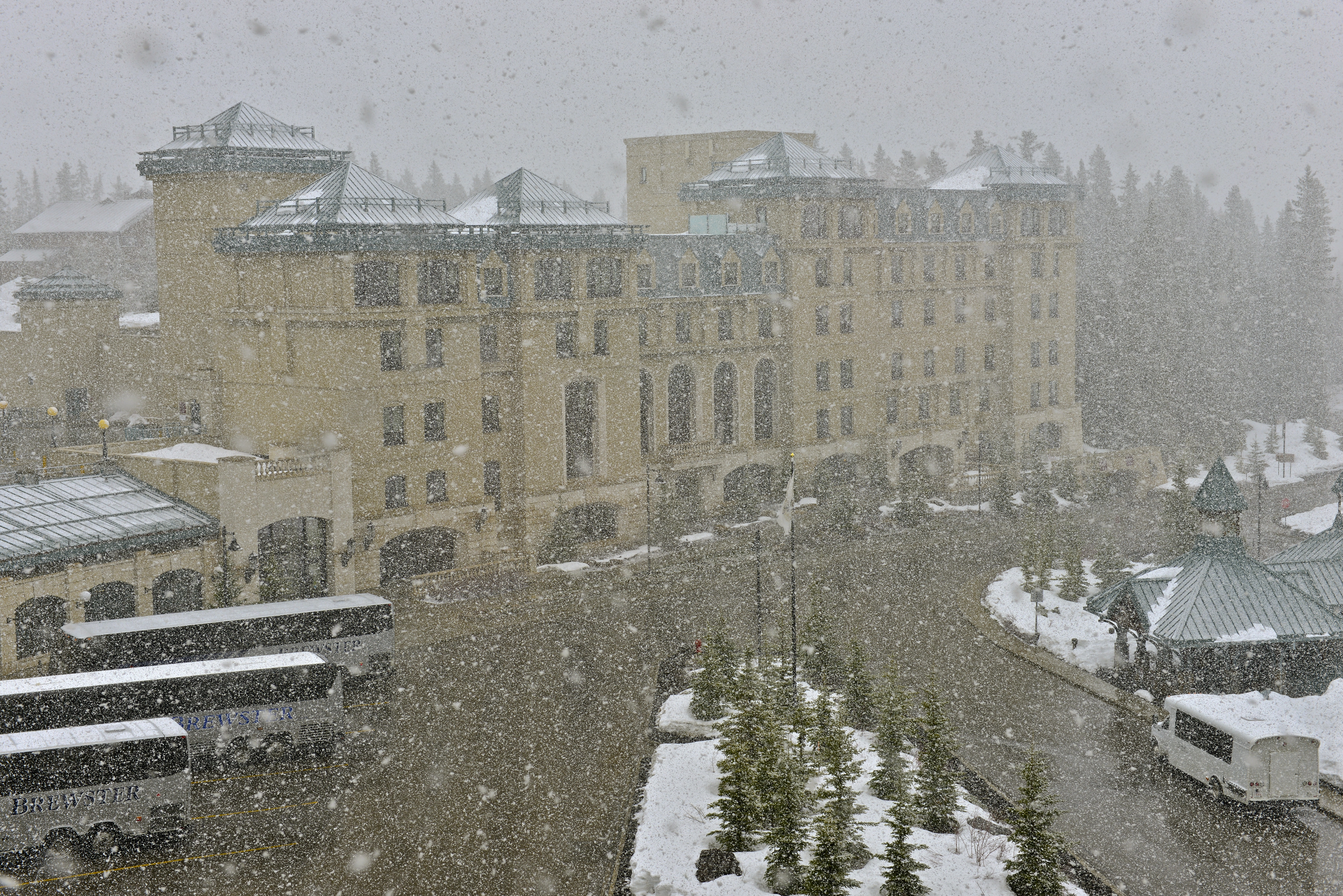 Chateau Lake Louise